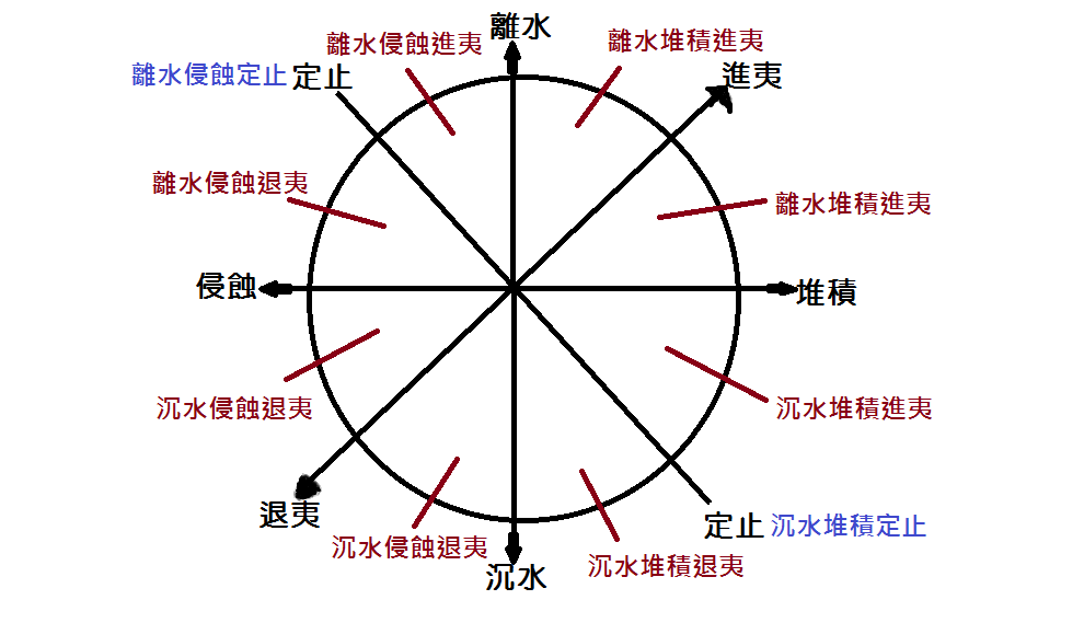 華倫亭海岸分類的圓形圖示表